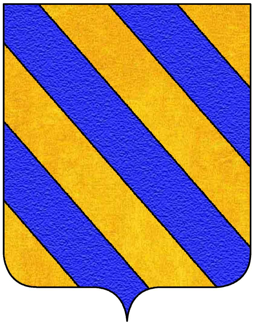 Stemma della famiglia Di Sangro